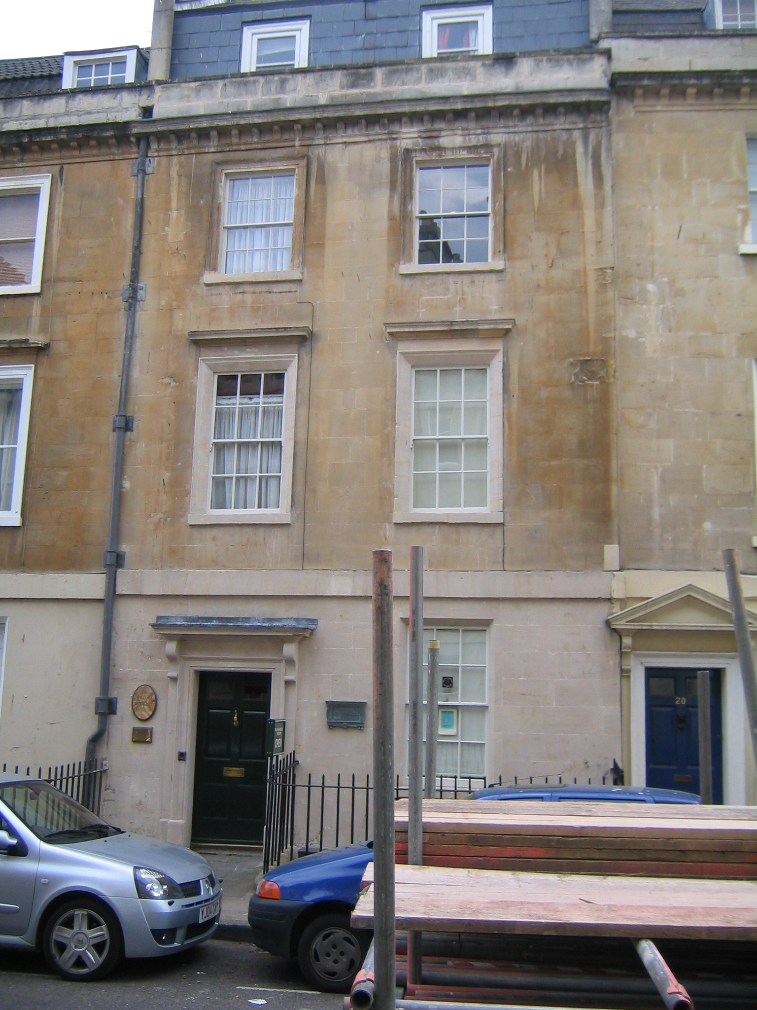 Ehemaliges Wohnhaus von Wilhelm Herschel in Bath, heute Herschel-Museum